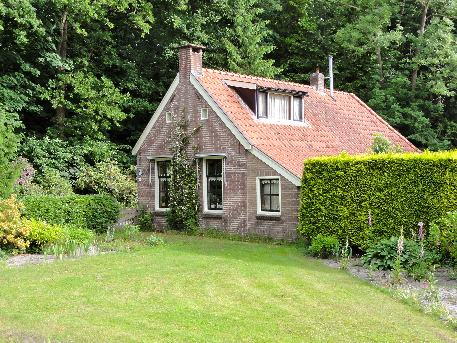 Koloniewoning - Maatschappij van Weldadigheid - Koningin Wilhelminalaan 85 Frederiksoord - rijksmonument